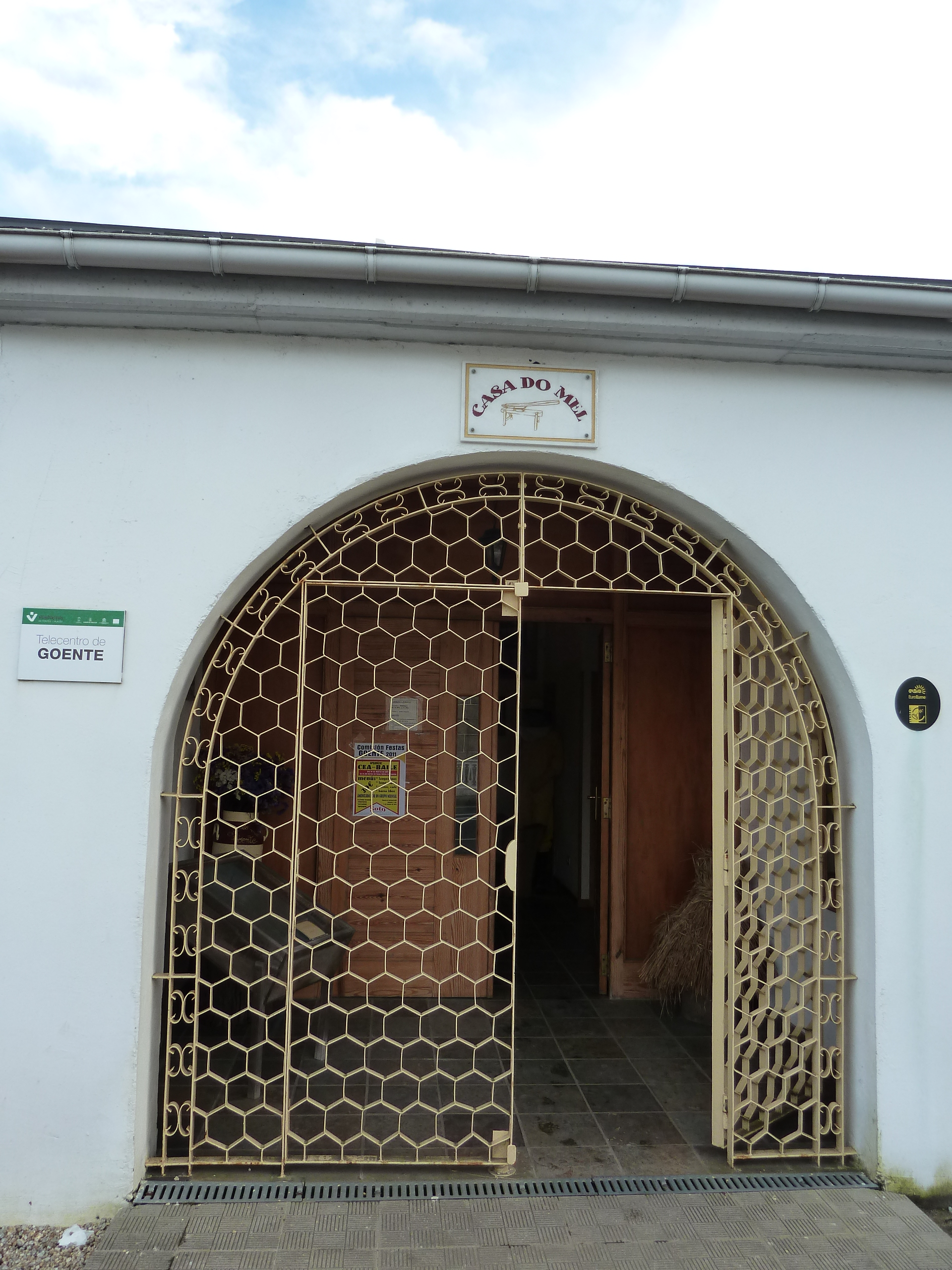 Porta principal con reixa de hexágonos da Casa do Mel en Goente (As Pontes de García Rodríguez).